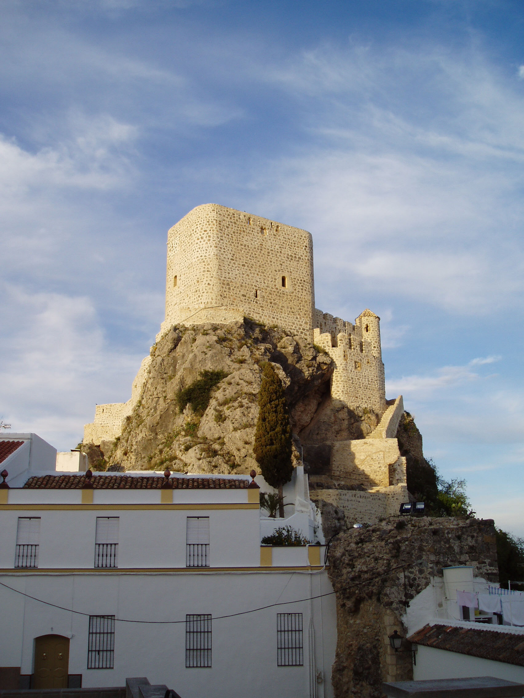 Castillo de Olvera, en la provincia de Cádiz, España.